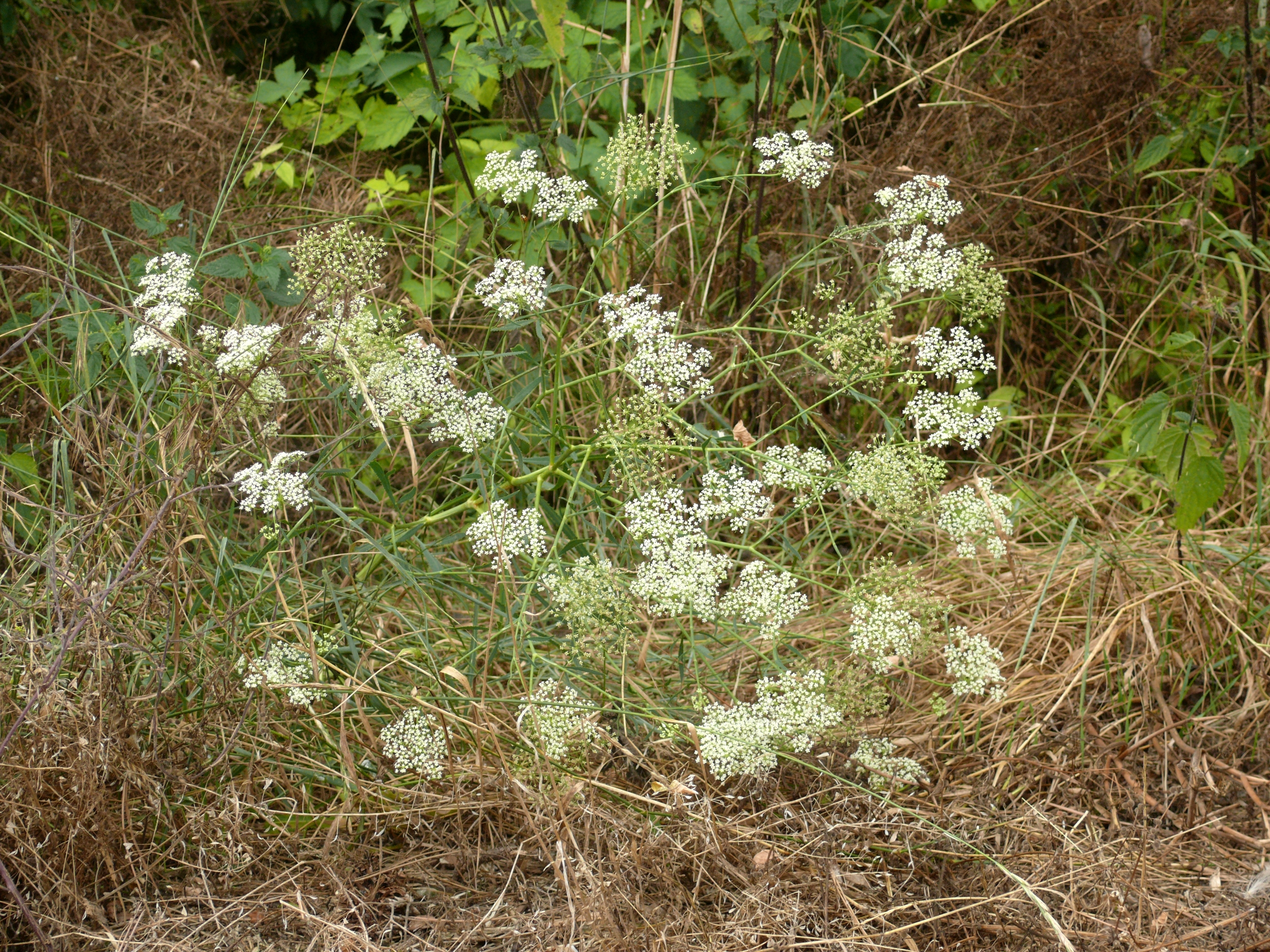 Falcaria vulgaris, Mainfranken